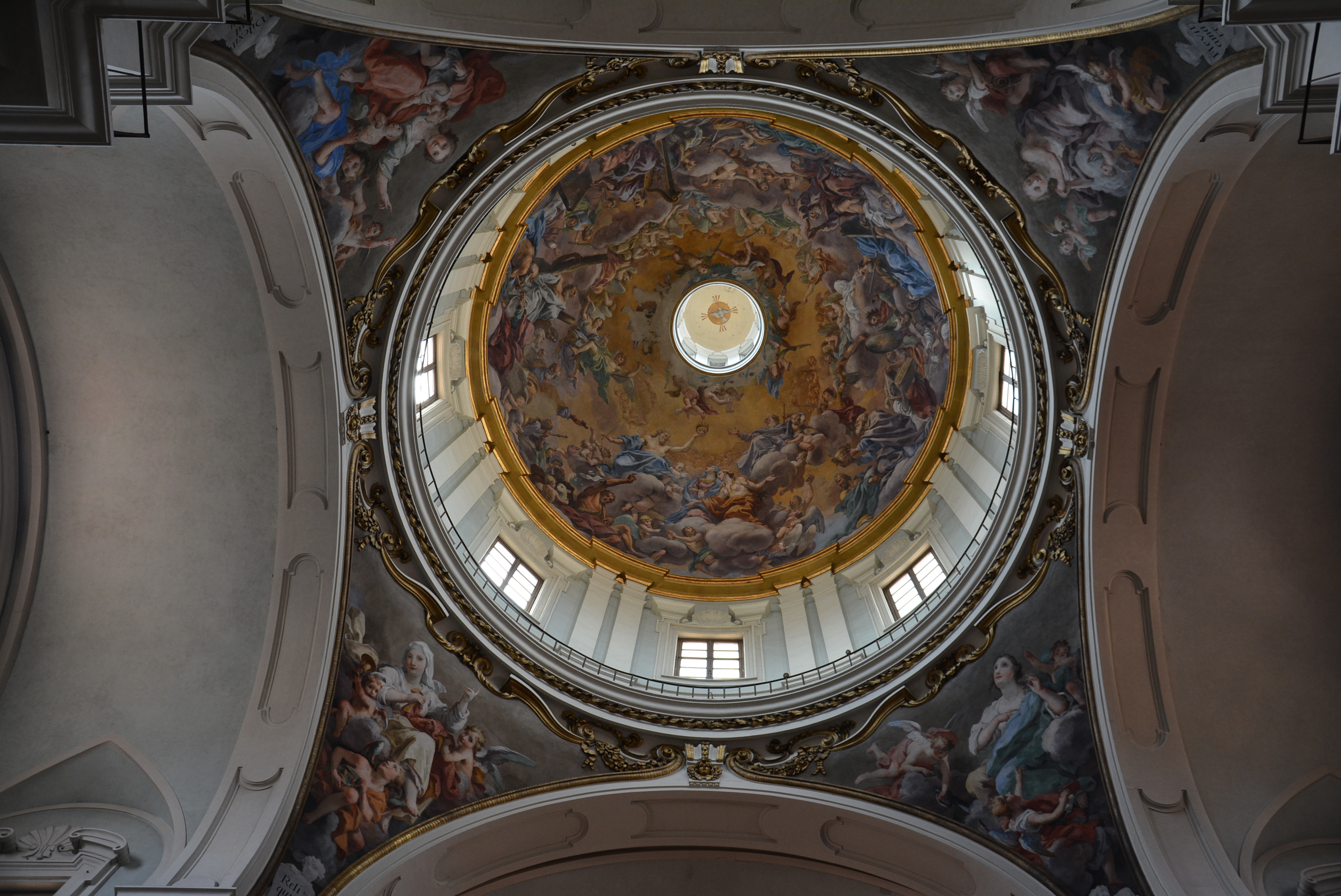 Chiesa di San Frediano in Cestello a Firenze